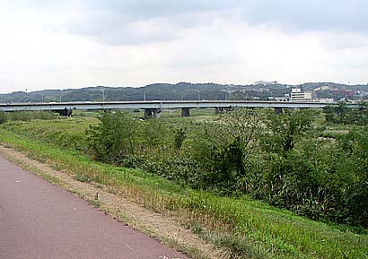 多摩川にかかる、鎌倉街道の橋梁（新橋）。左が東京都府中市、右が多摩市。